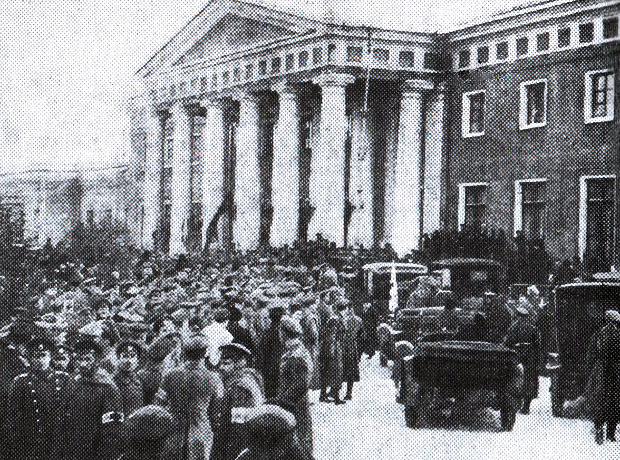 Петроград. 1 марта 1917 г. Школа прапорщиков около Таврического дворца.